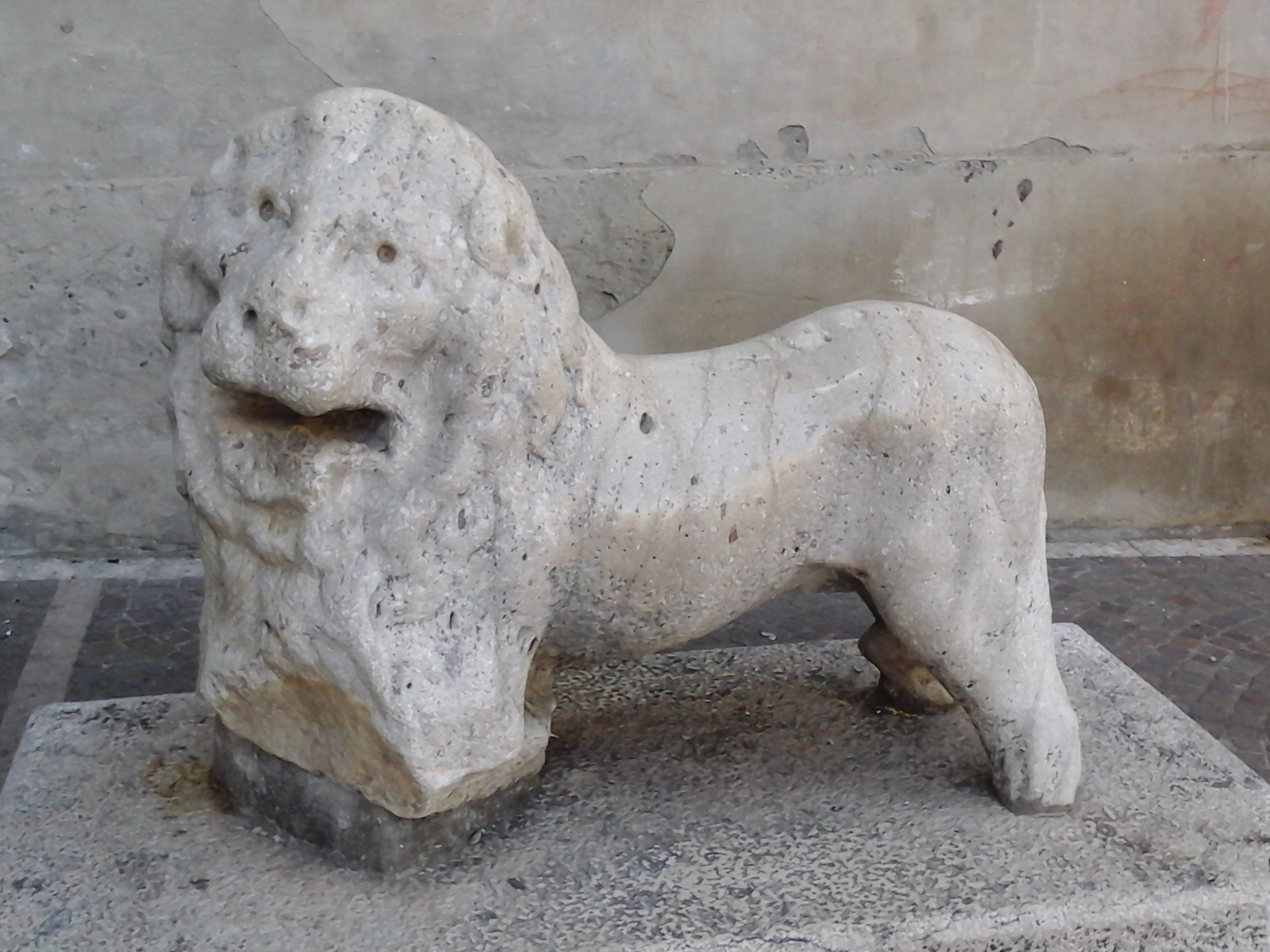 Leone in pietra, Ascoli Satriano